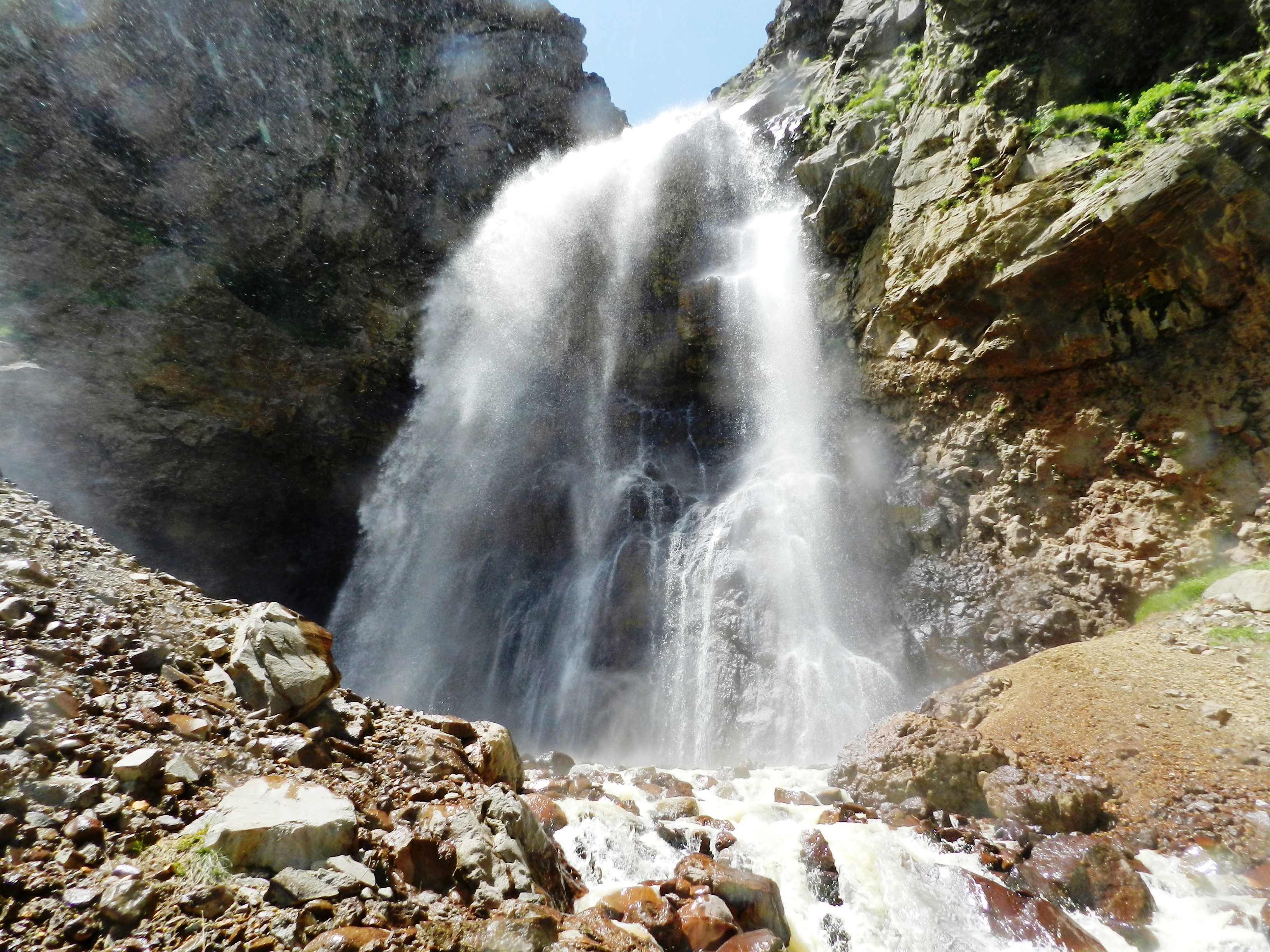 Գեղարոտի ջրվեժ, Հայաստան